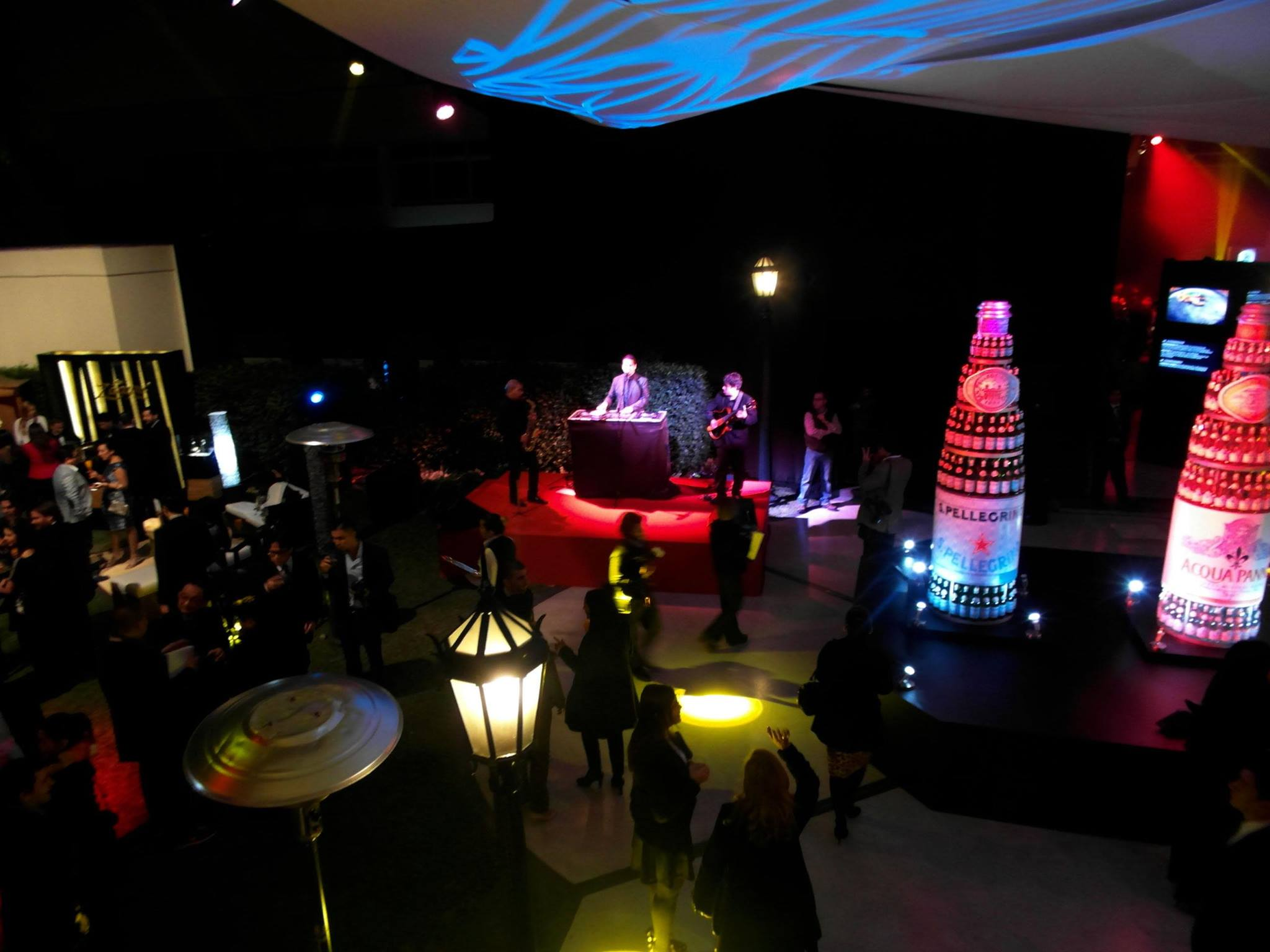 Foto del show cholo soy sessions en Lima Peru.